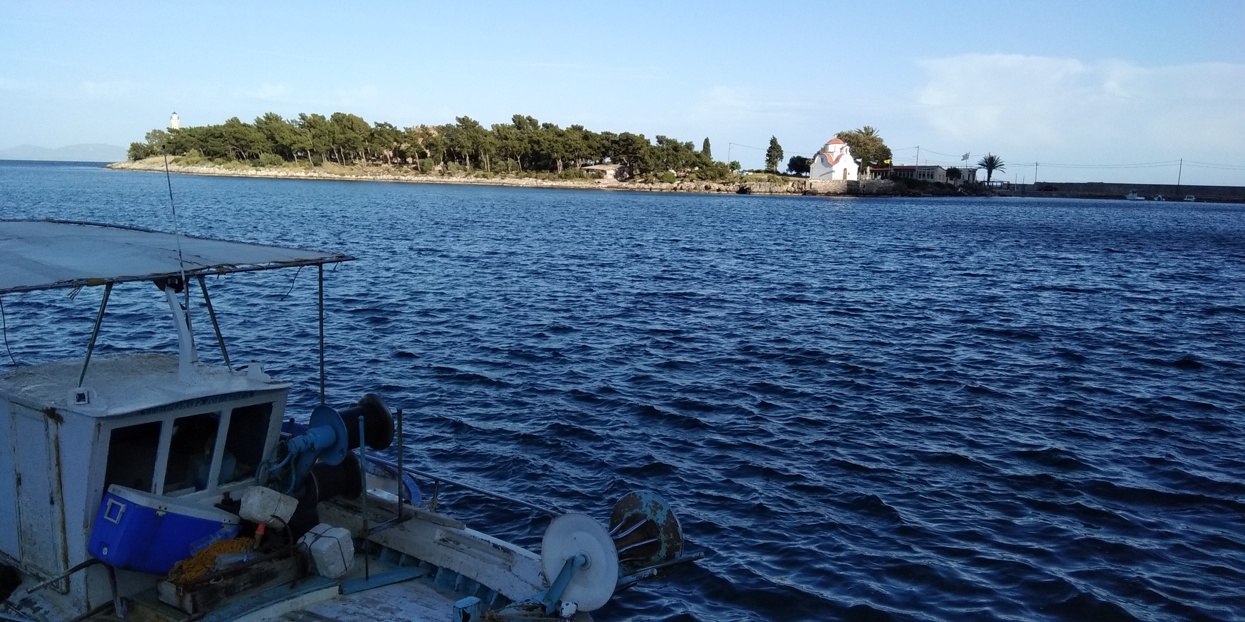 Île de Kranae depuis les quais de Gythio